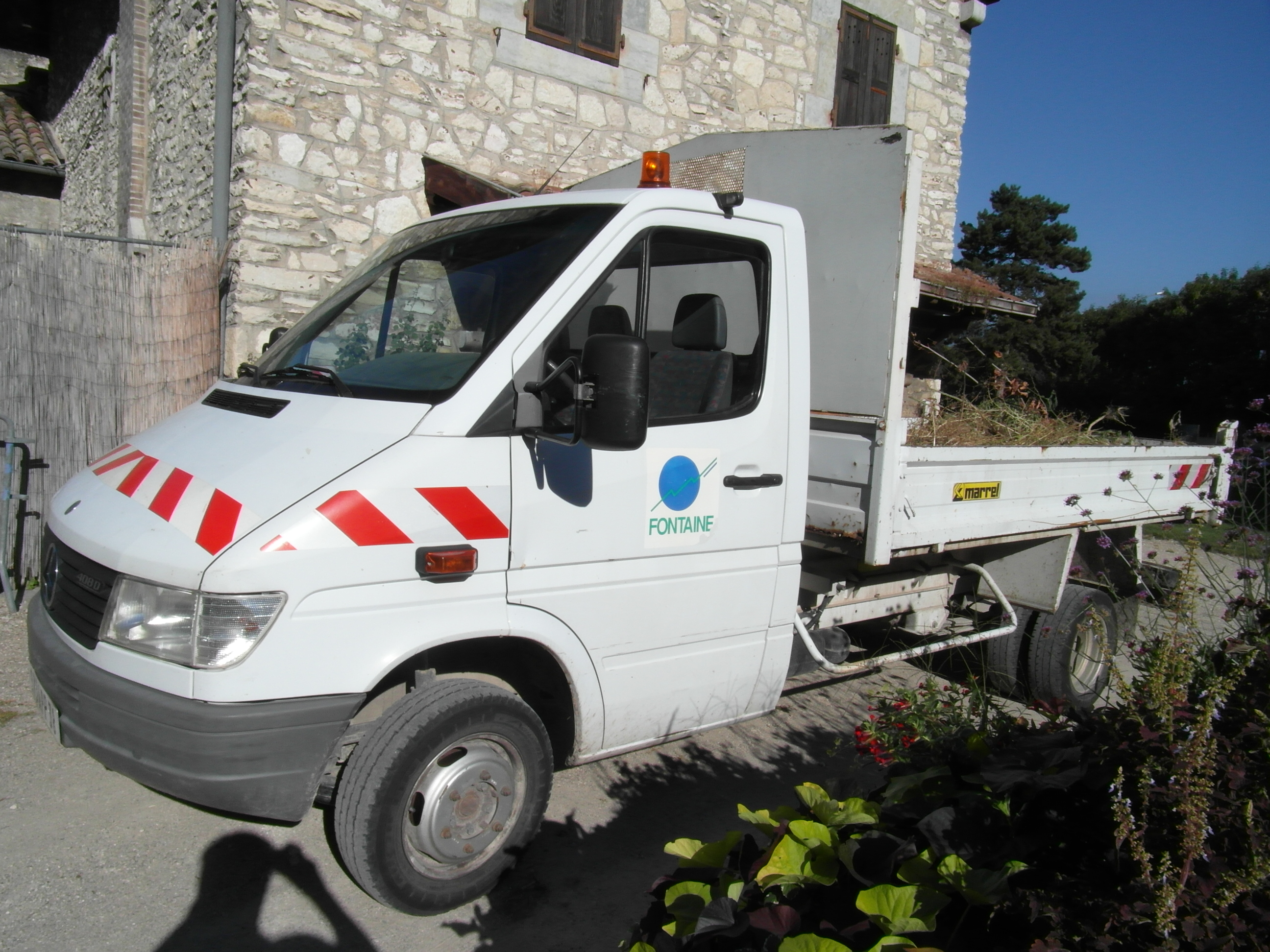 Véhicule des services techniques de Fontaine